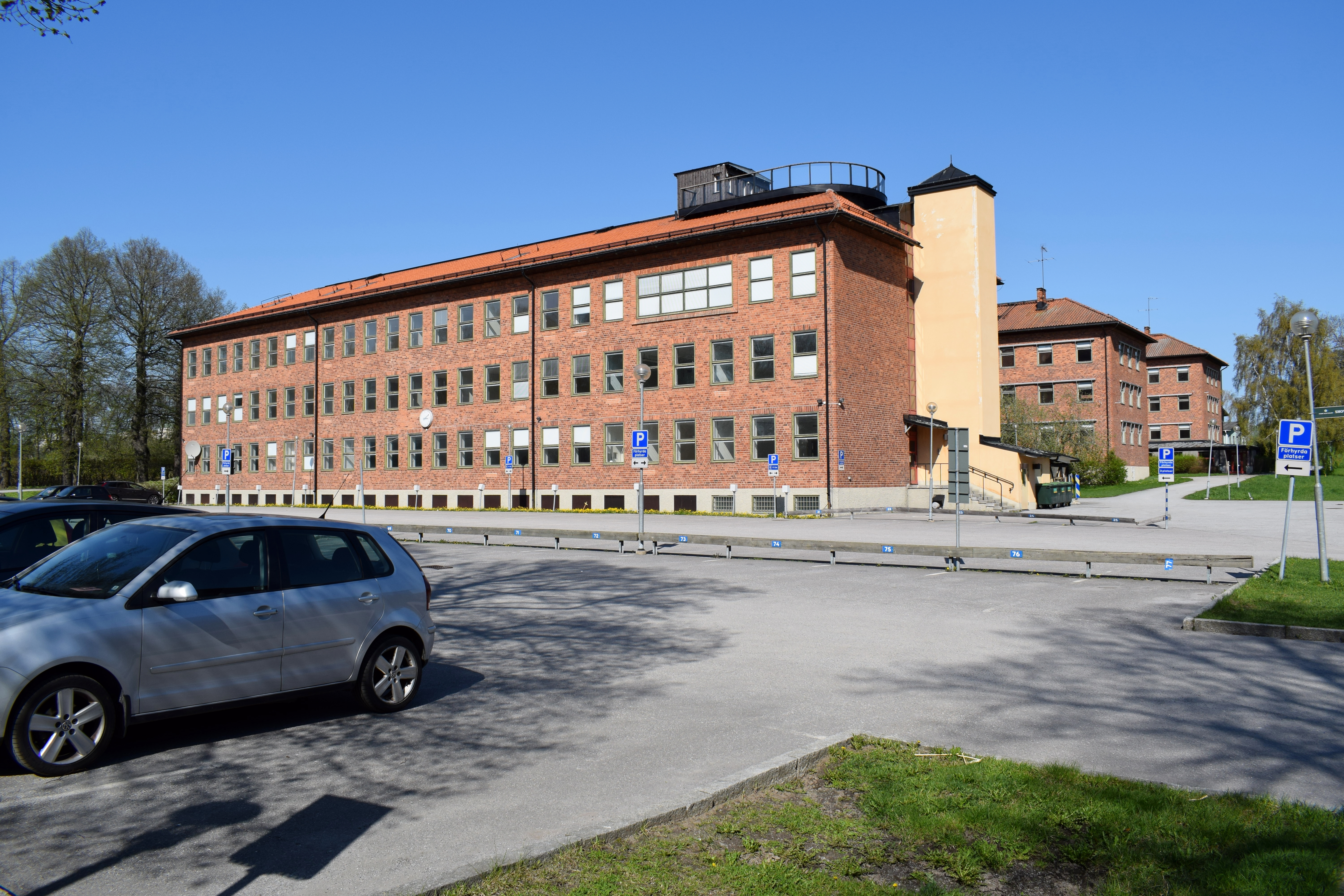 Skolbyggnad vid Näsbypark, Täby kommun.